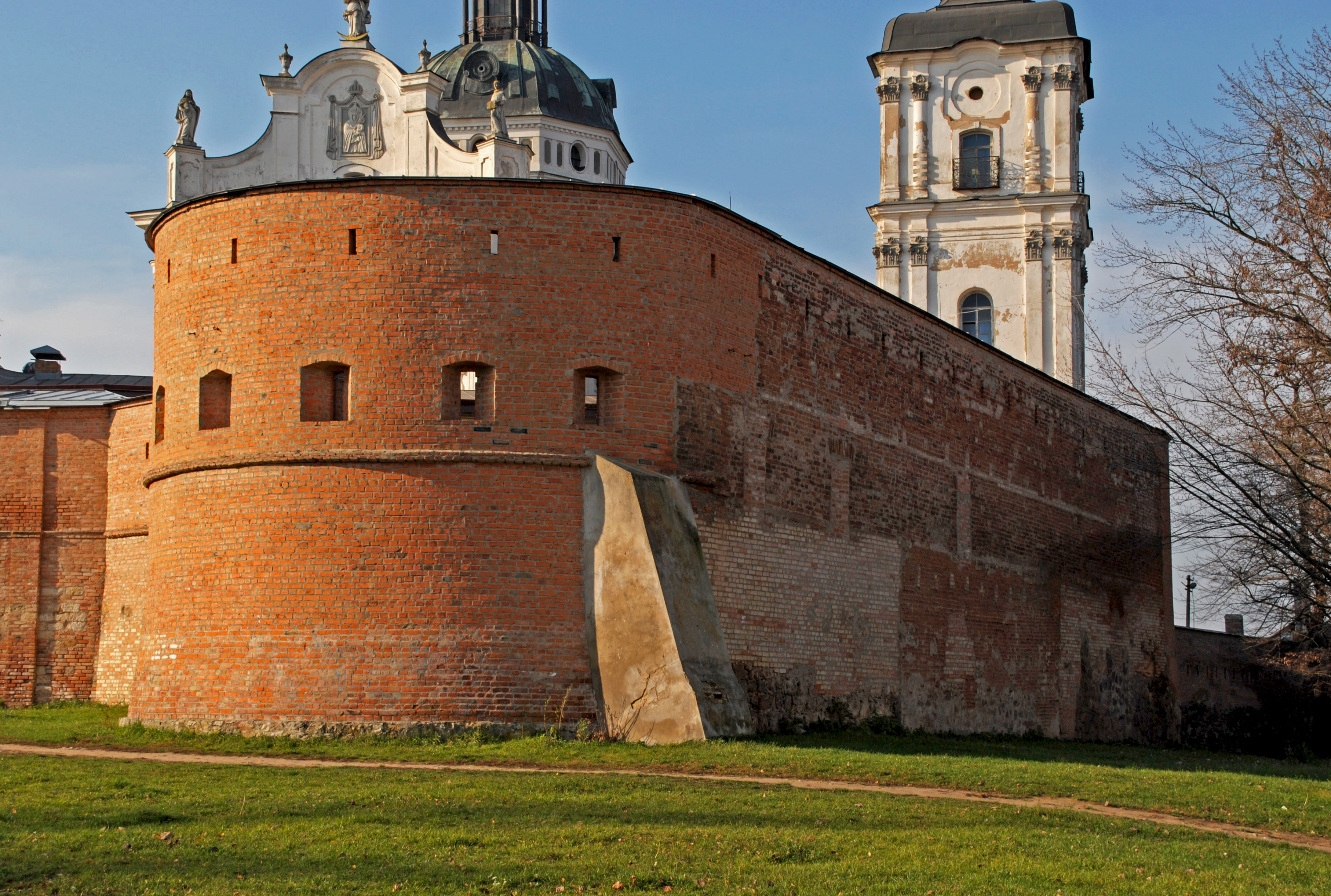 Фортечні мури з баштами та келіями, Бердичів, Соборна пл., 25